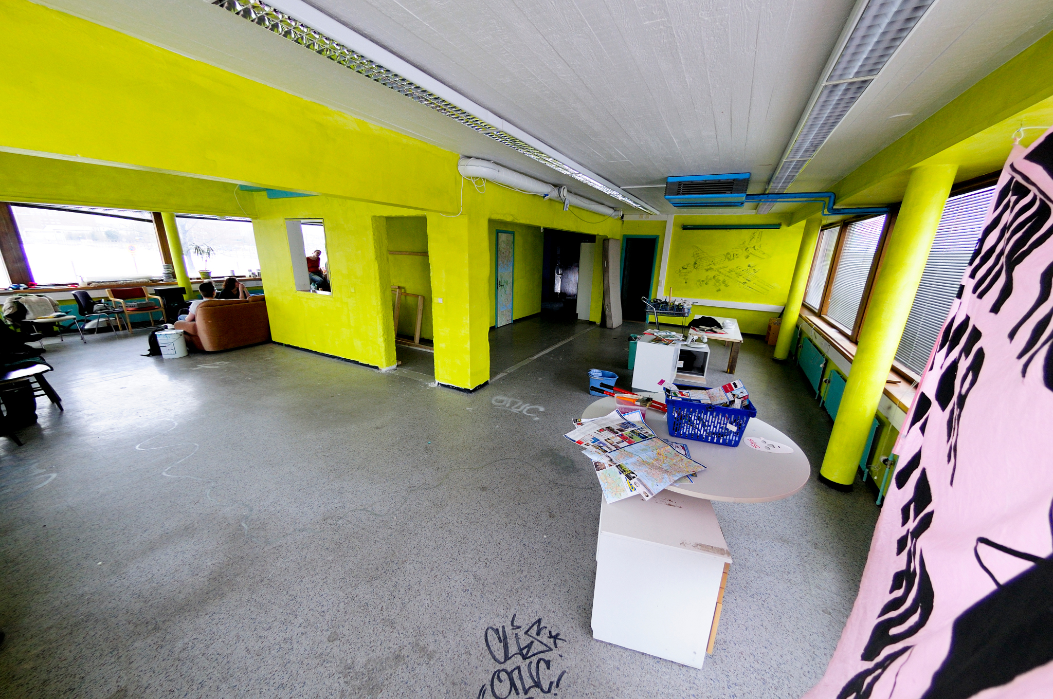 The first floor of Sosiaalikeskus Satama.